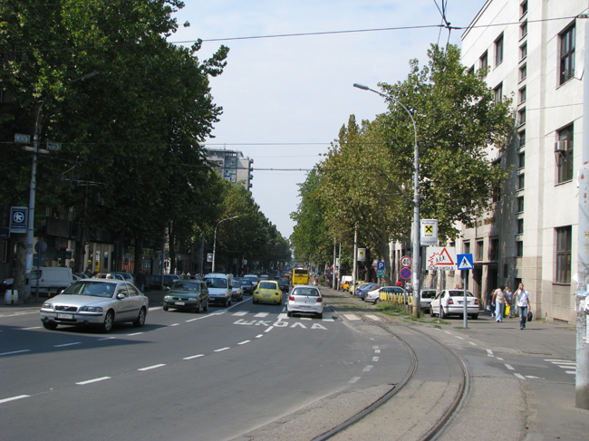 La rue Cara Dušanova à Belgrade est située dans le quartier de Dorćol (municipalité de Stari Grad)